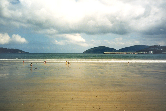 Playa de Covas (Vivero) Fotografía realizada por Lourdes Cardenal en agosto de 1987.